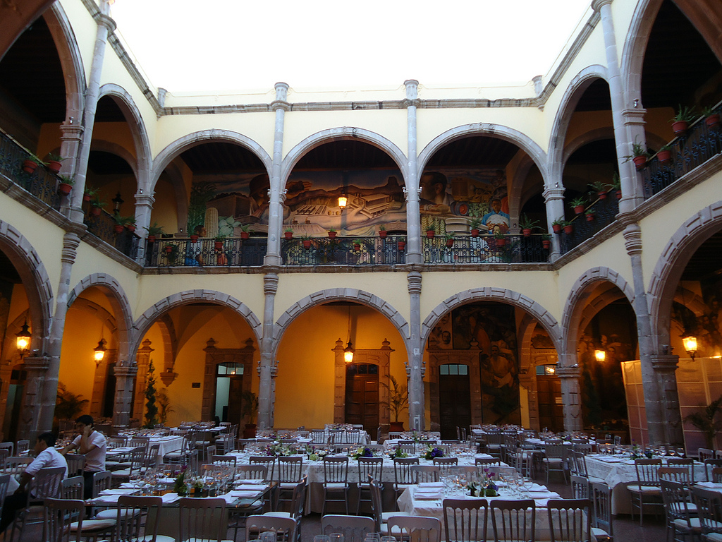 Interior del palacio de Zambrano antes del comienzo de un evento.